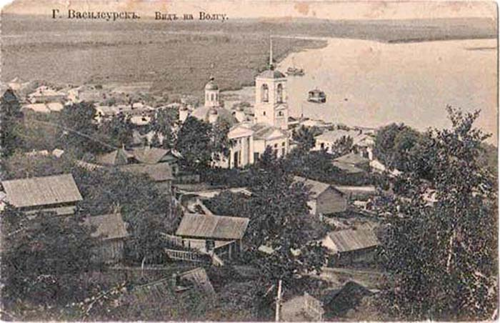 Старый Васильсурск фото